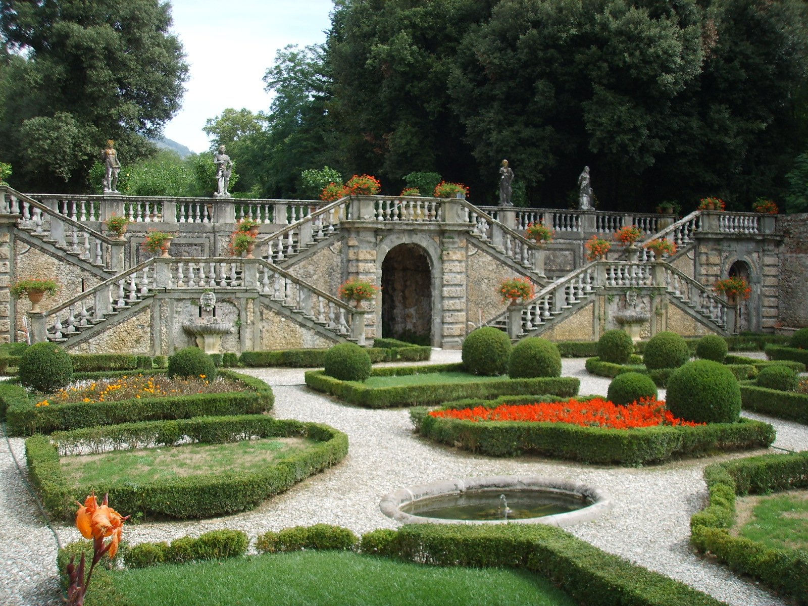 Villa torrigiani di lucca, scalinata